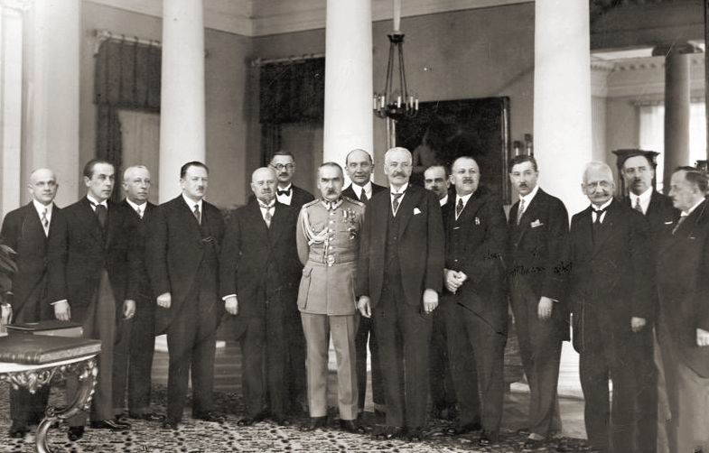 Polish Government under Prime Minister Kazimierz Bartel , 29.12.1929